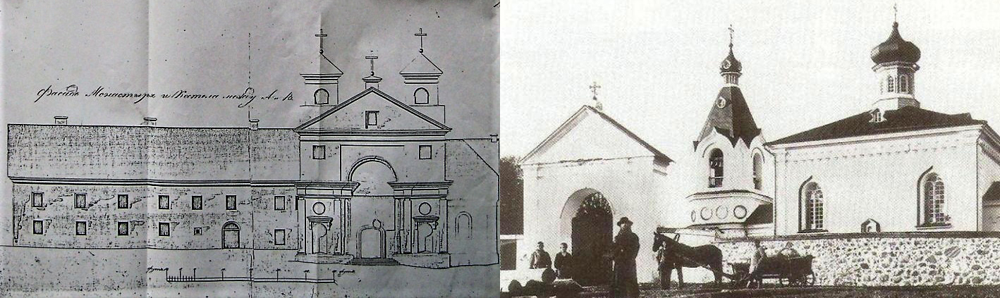 Беларуская (тарашкевіца): Маскалізацыя (русіфікацыя) Вялікага Княства Літоўскага. Мястэчка Алькенікі Троцкага павету. Касьцёл Сьвятога Дамініка пры кляштары дамініканаў, помнік архітэктуры барока: аўтэнтычны выгляд (налева) і па частковым руйнаваньні ў выніку маскоўскай перабудовы (направа)